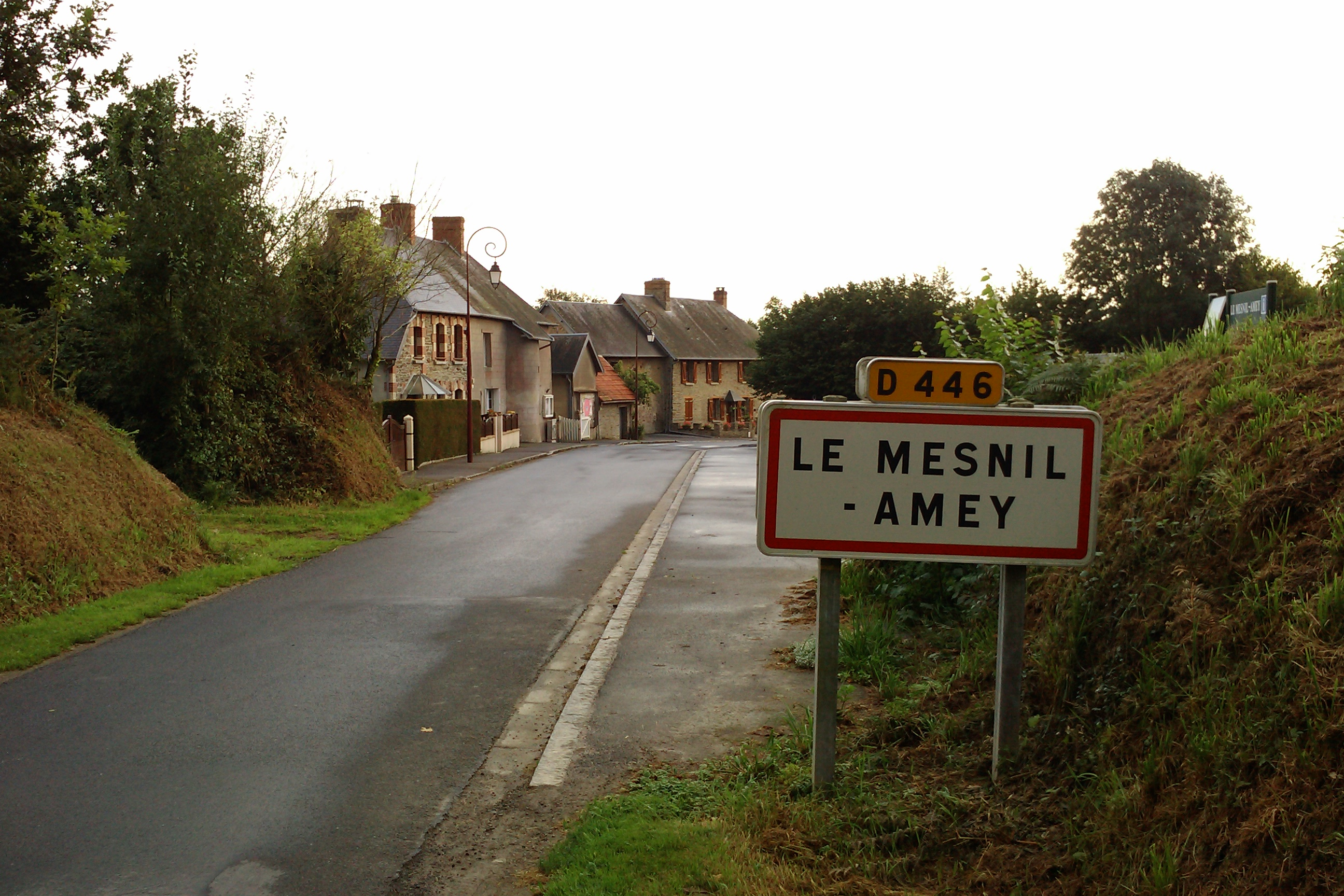 le bourg du Mesnil-Amey]